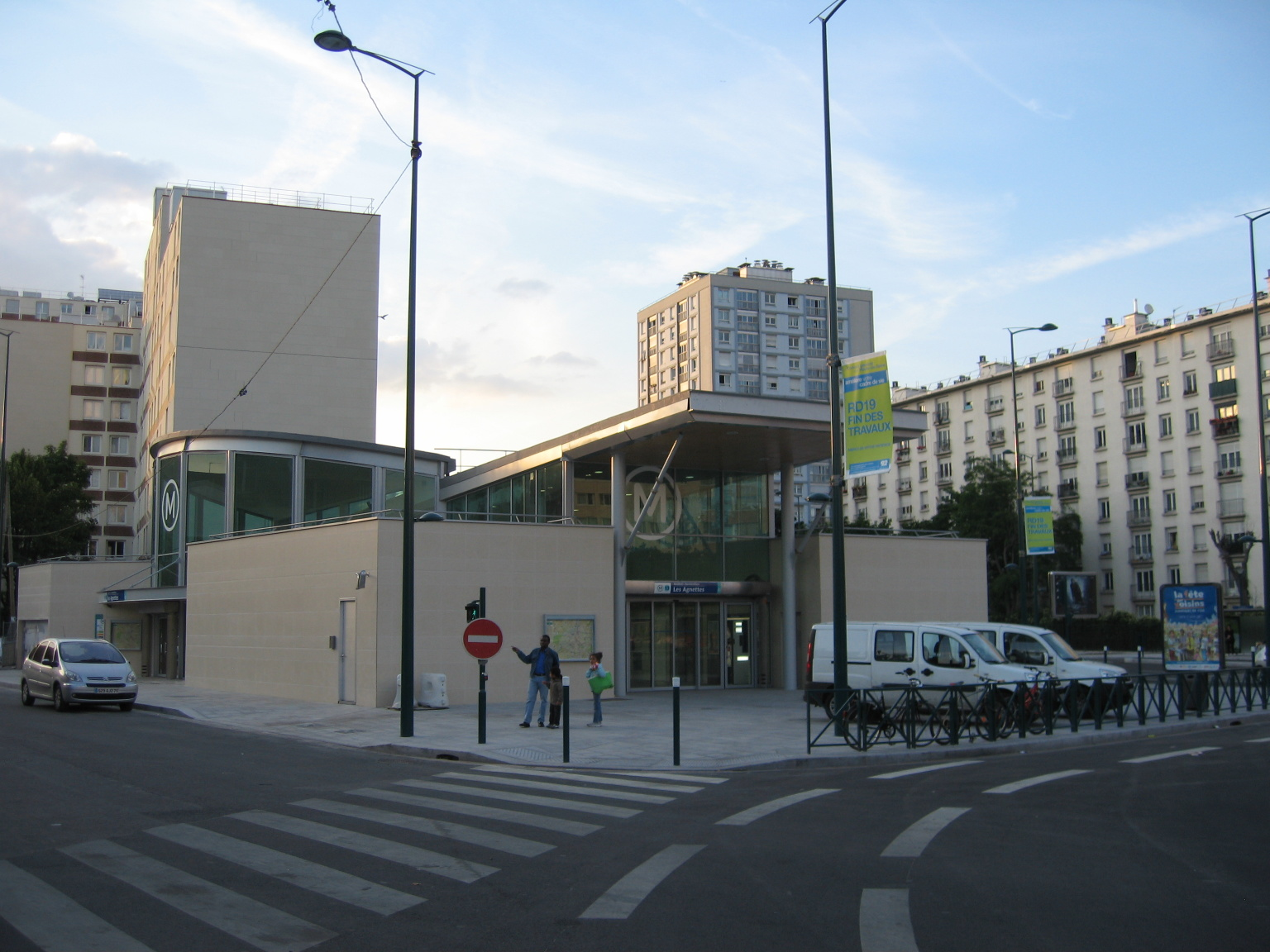 Asnières - Gennevilliers - Les Agnettes, ligne 13 du métro de Paris, le jour de l'inauguration.